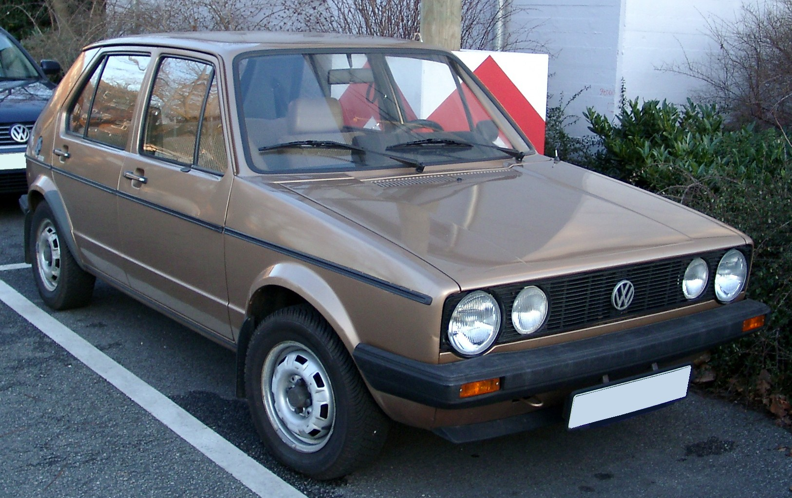 VW Golf I